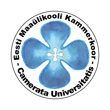 Eesti Maaülikooli kammerkoori Camerata Universitatis logo.